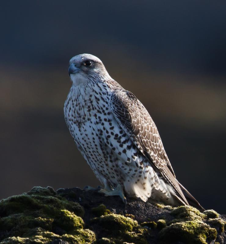 Gyr falcon - Falco rusticolus